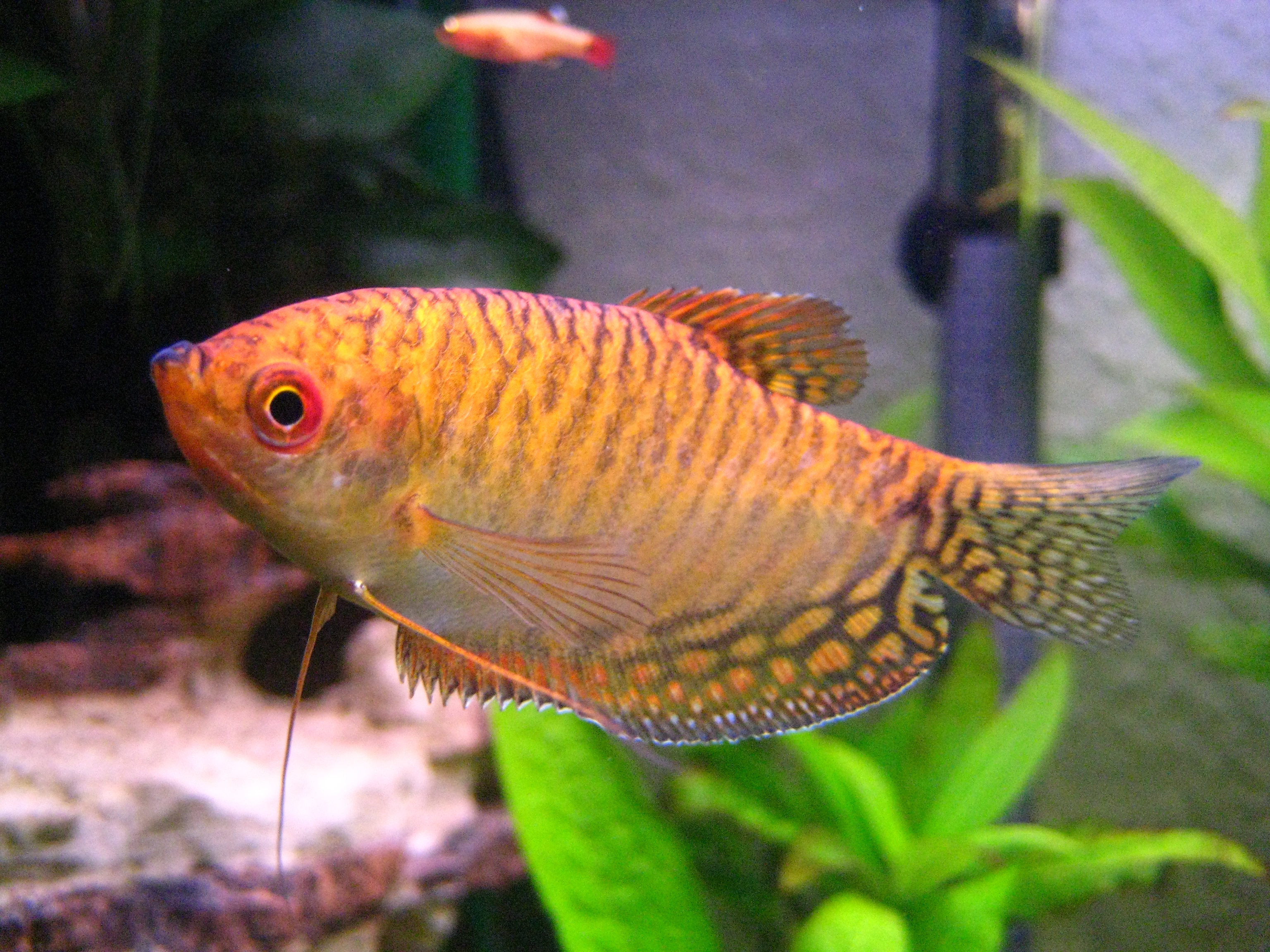 gelber Fadenfisch (Trichogaster trichopterus gold)